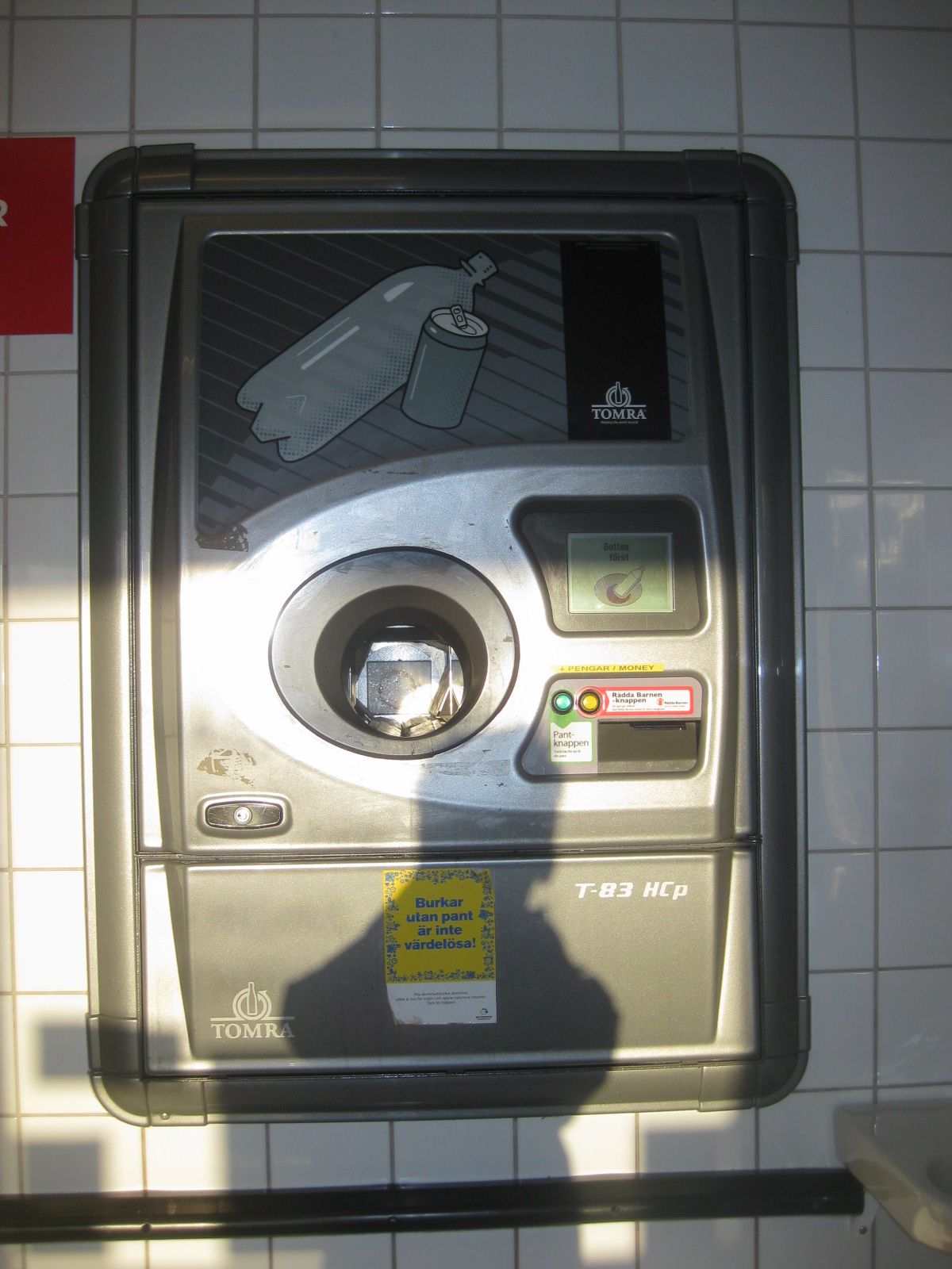 Pantcentral i affären Willys.